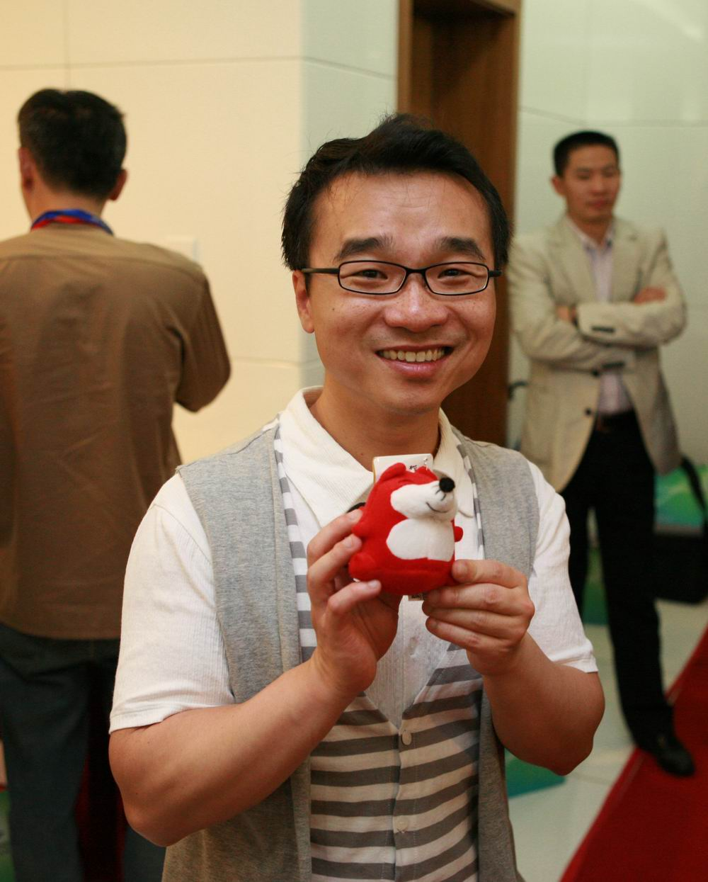 Raman Hui